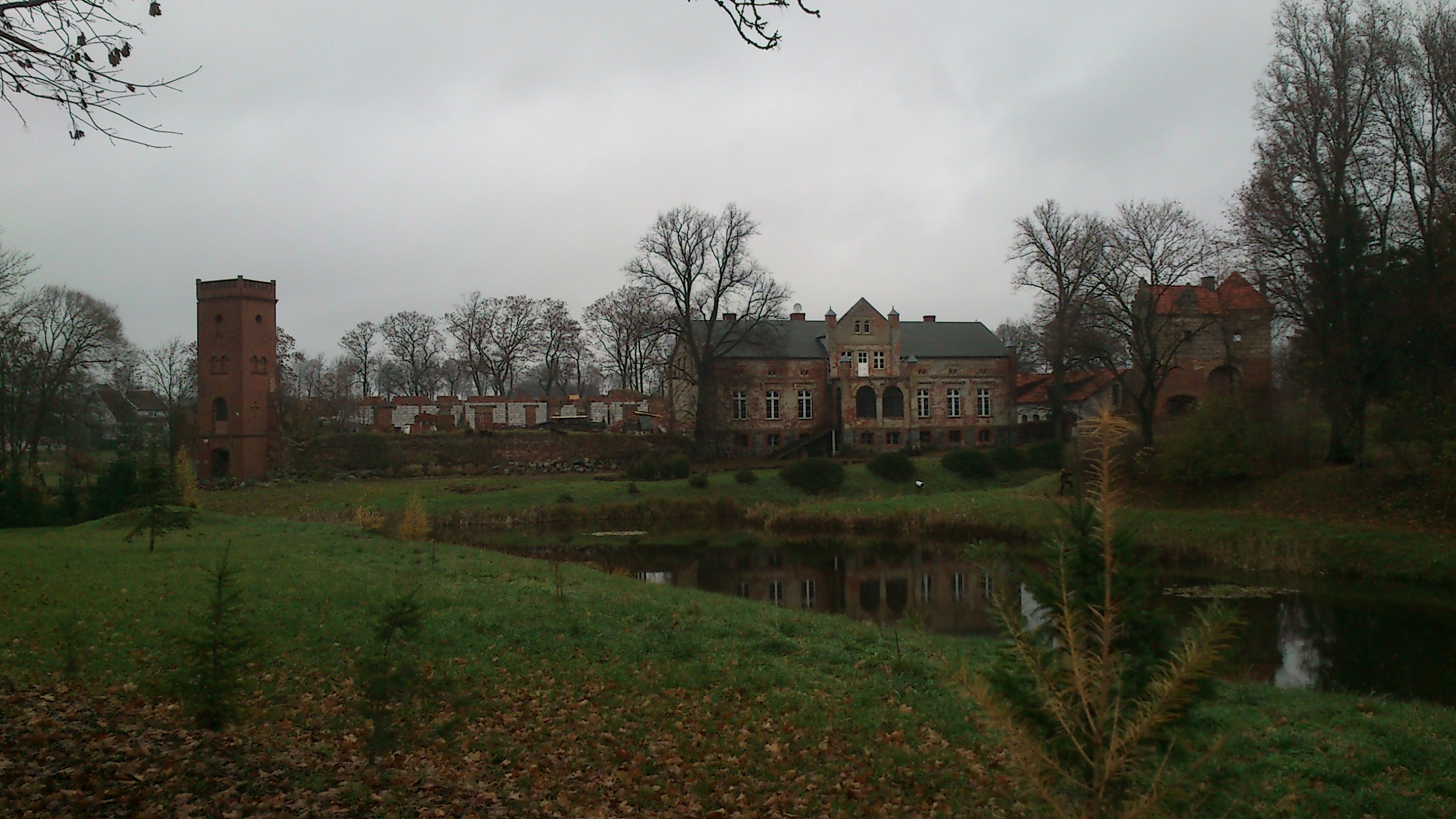 Widok na Zamek Kiszewski